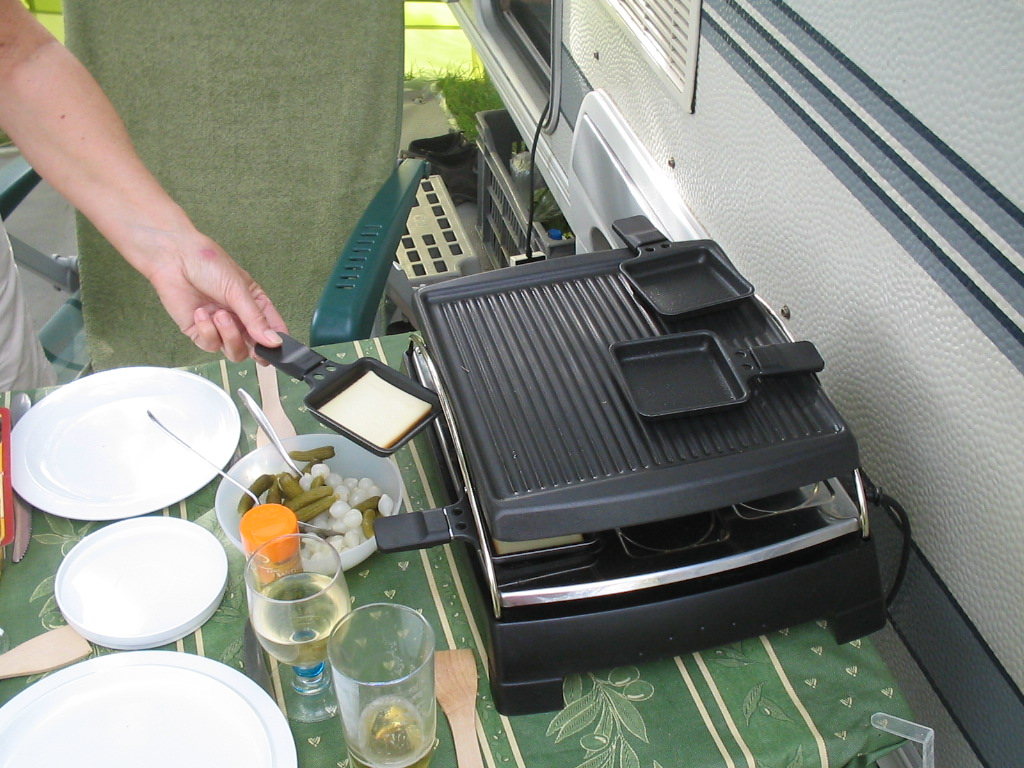 raclette, France, june 2005